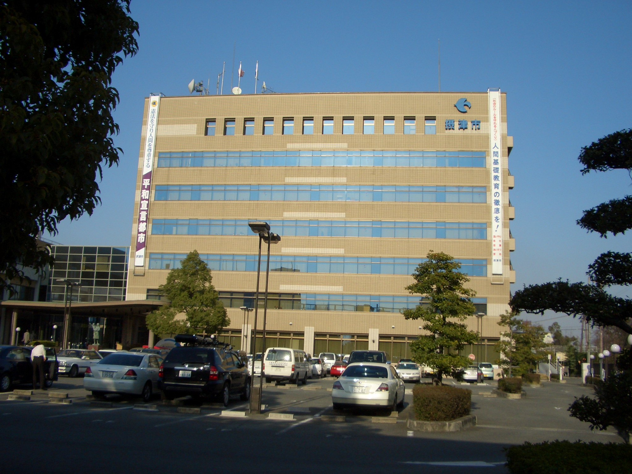 Settsu_city_hall in Osaka,Japan. 摂津市役所